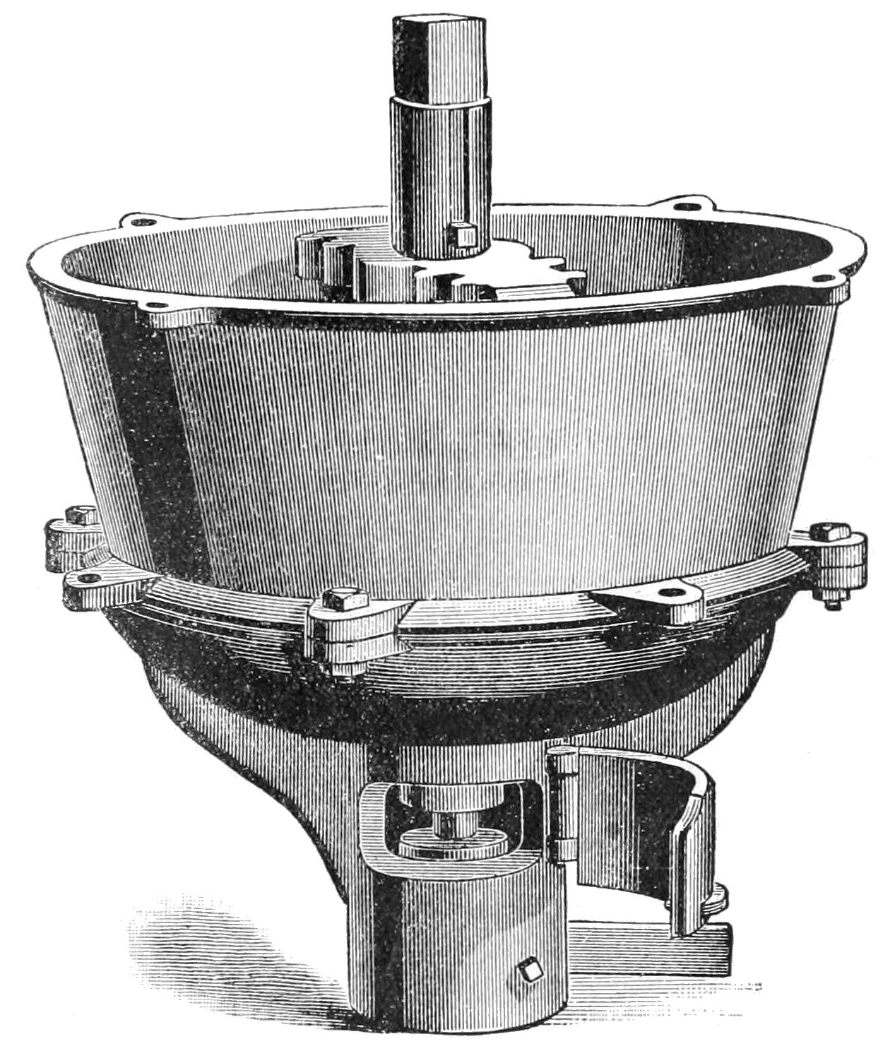 Bark mill